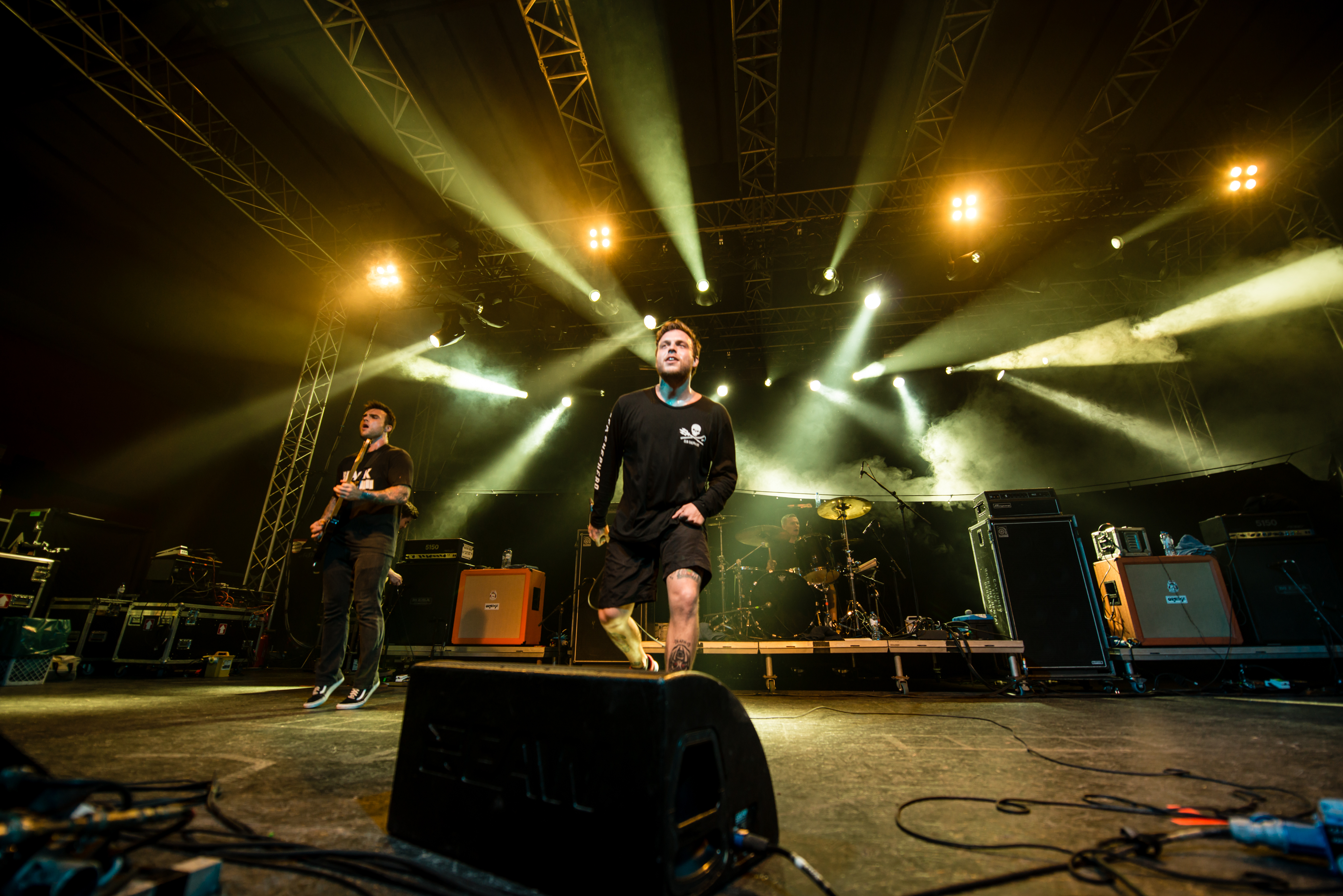 'Impericon Festival 2015; Oberhausen Turbinenhalle': 'Stick to Your Guns'